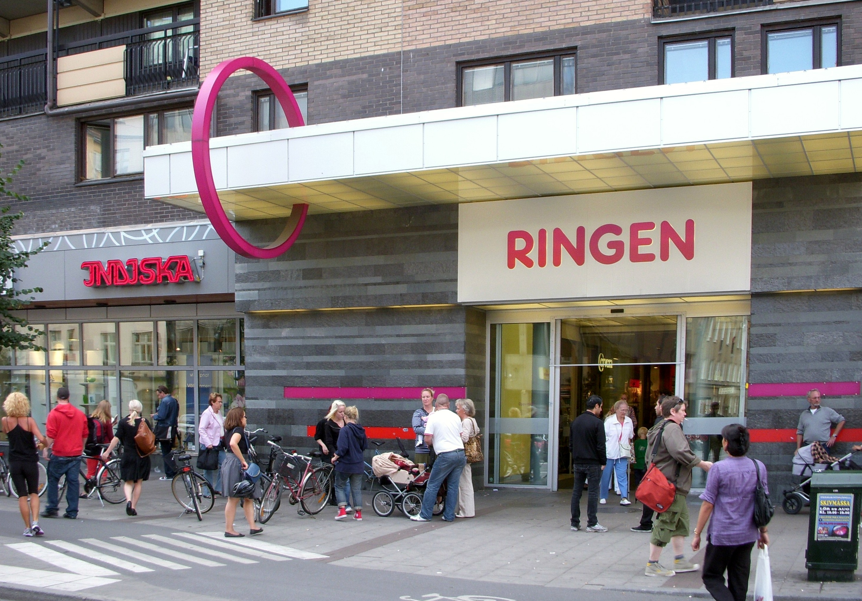 Ringens köpcentrum på Södermalm i Stockholm, entré från Götgatan